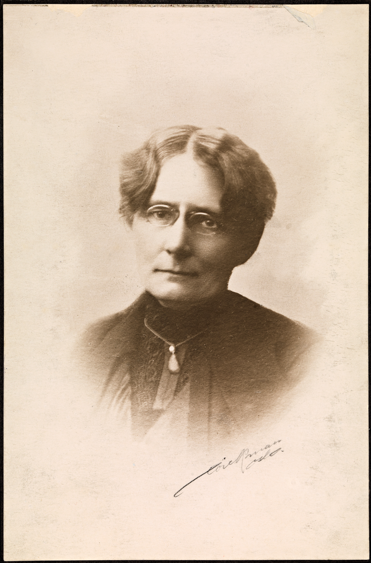 Tittel / Title: Portrett av Fernanda Nissen Dato / Date: ukjent / unknown Fotograf / Photographer: ukjent / unknown (signert, men vanskelig å tyde) Sted / Place: Oslo Eier / Owner Institution: Nasjonalbiblioteket / National Library of Norway Lenke / Link: Bildesignatur / Image Number: blds_04518